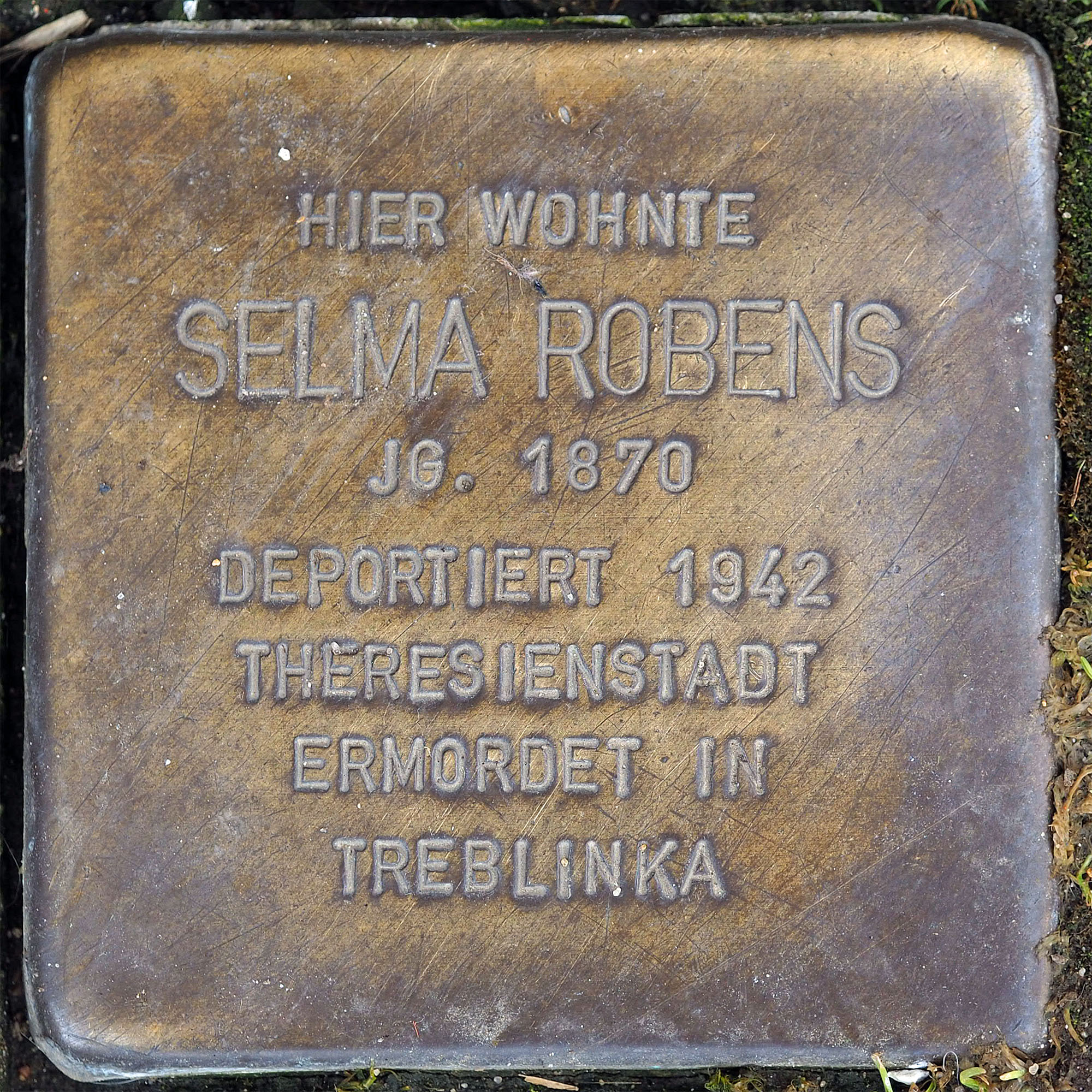 Stolpersteine MG: Robens, Selma